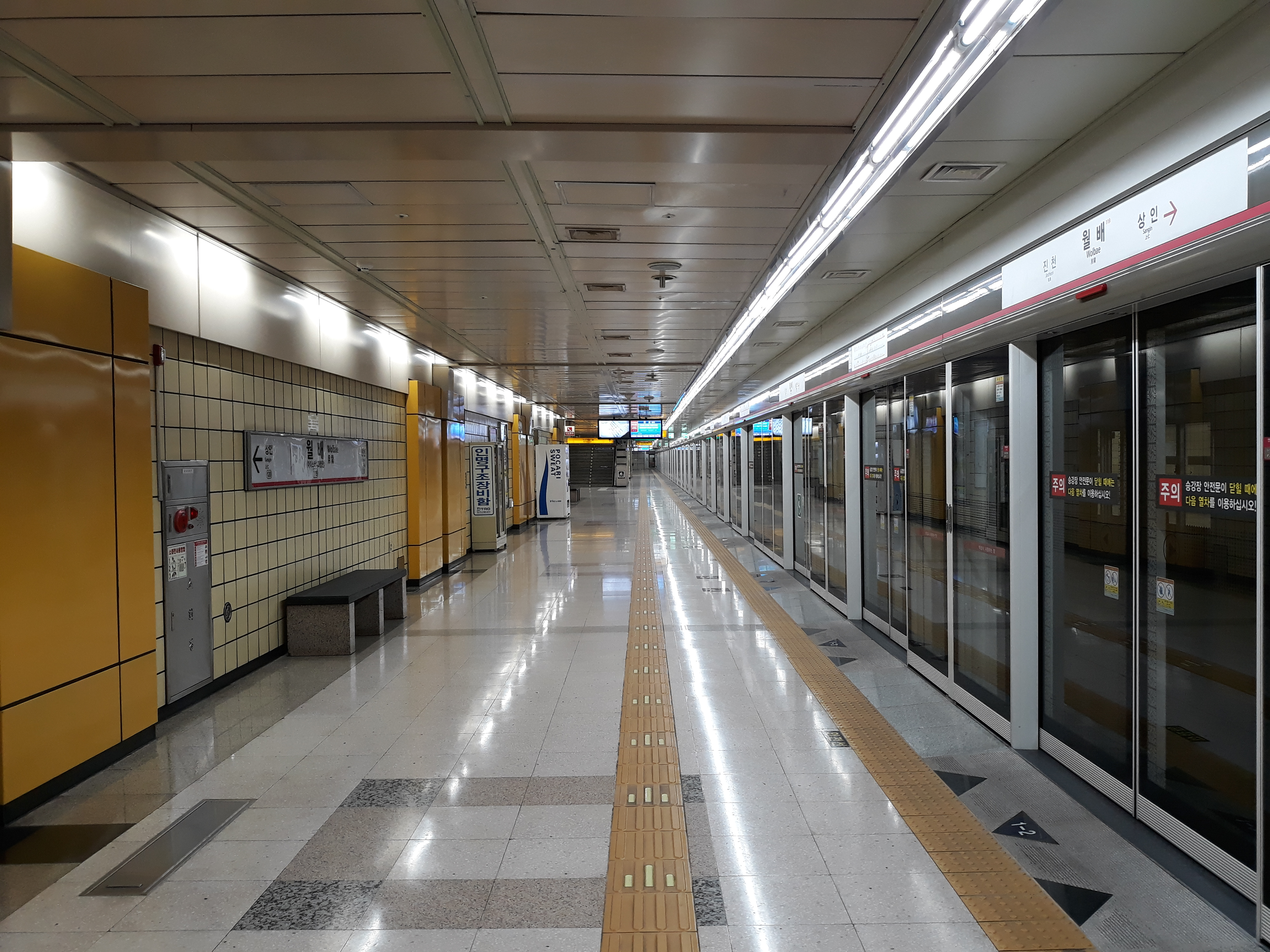 대구 도시철도 1호선 월배역 안심 방면 승강장